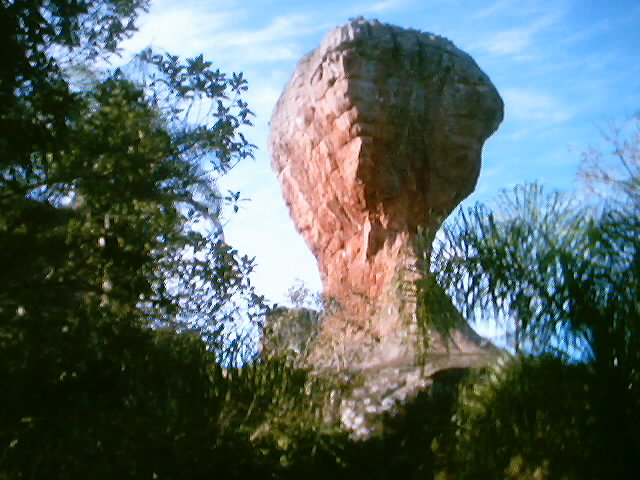 Paraná Brasil. O local chama-se Vila Velha, é um dos mais belos pontos turísticos do Estado. By Angeloleithold 2005